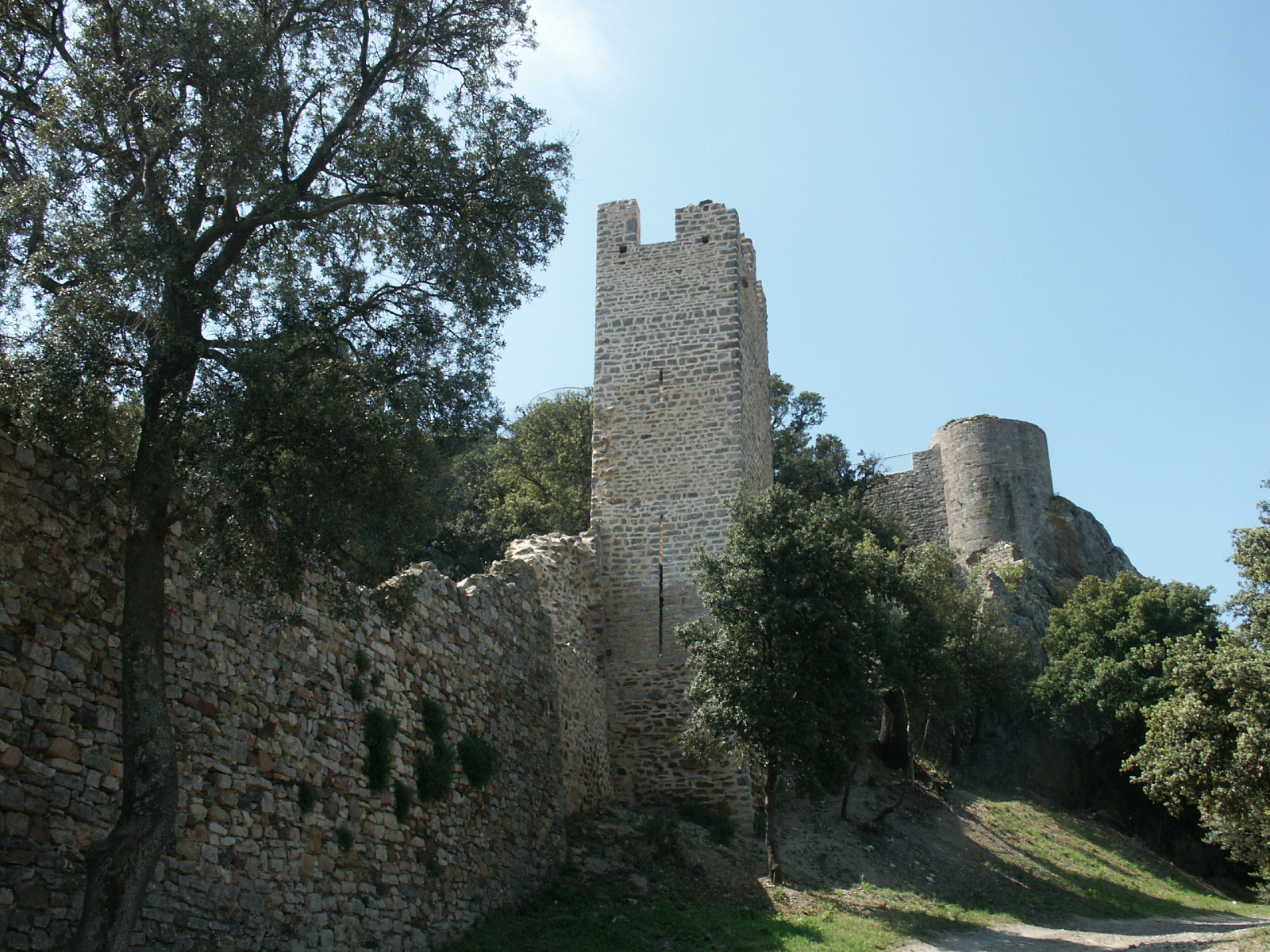 Courtine et tour de la première enceinte médiévale de la ville d'Hyères (premier plan) à sa jonction avec le château proprement dit dont on aperçoit la tour la plus septentrionale (second plan). L'enceinte ne serait pas antérieure au XIIIe siècle. Vue extra-muros.